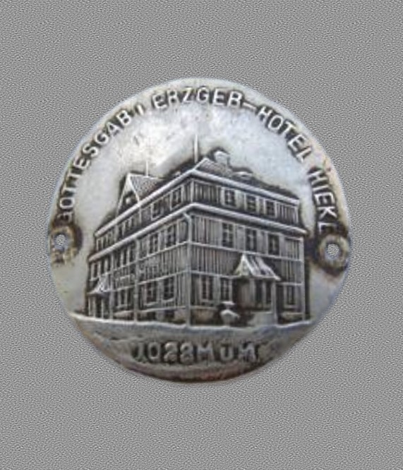 Turistický štítek hotelu Hieke (dnes Praha) Boží Dar